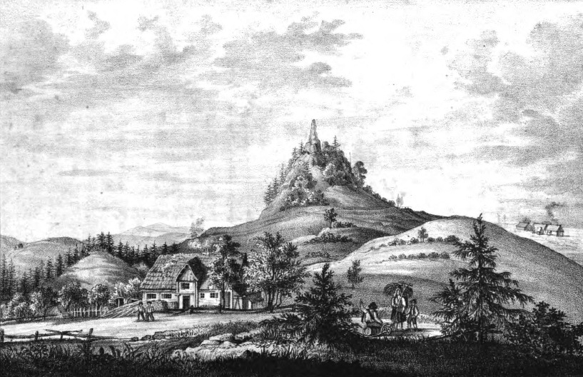 Ruine Hummelschloss